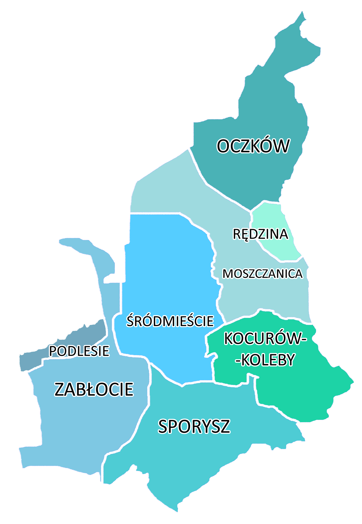 podział admin Żywca